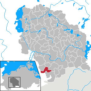 Karrenzin in Mecklenburg-Vorpommern - District Parchim